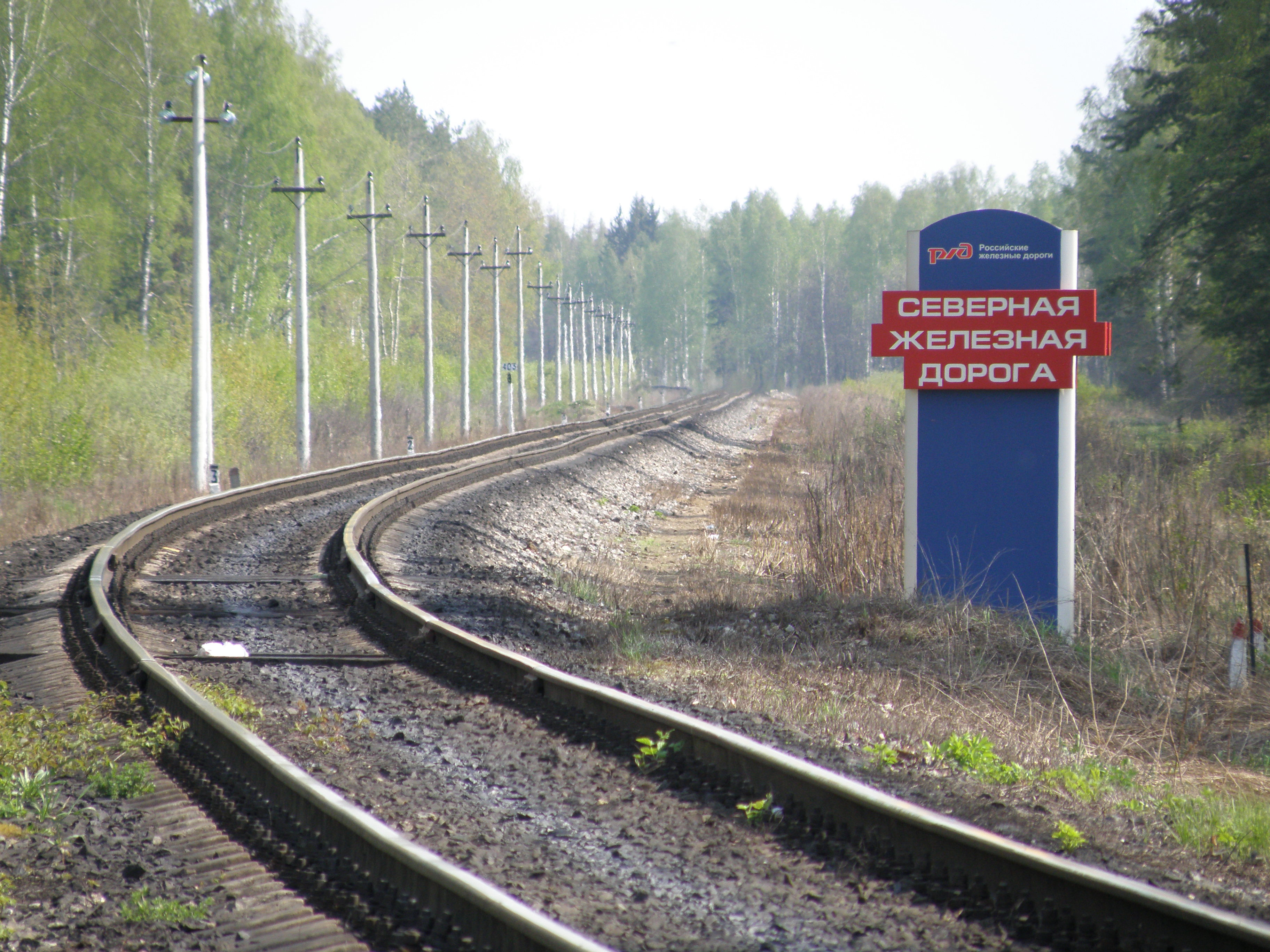 Северная ж. д., граница у ст. Новки